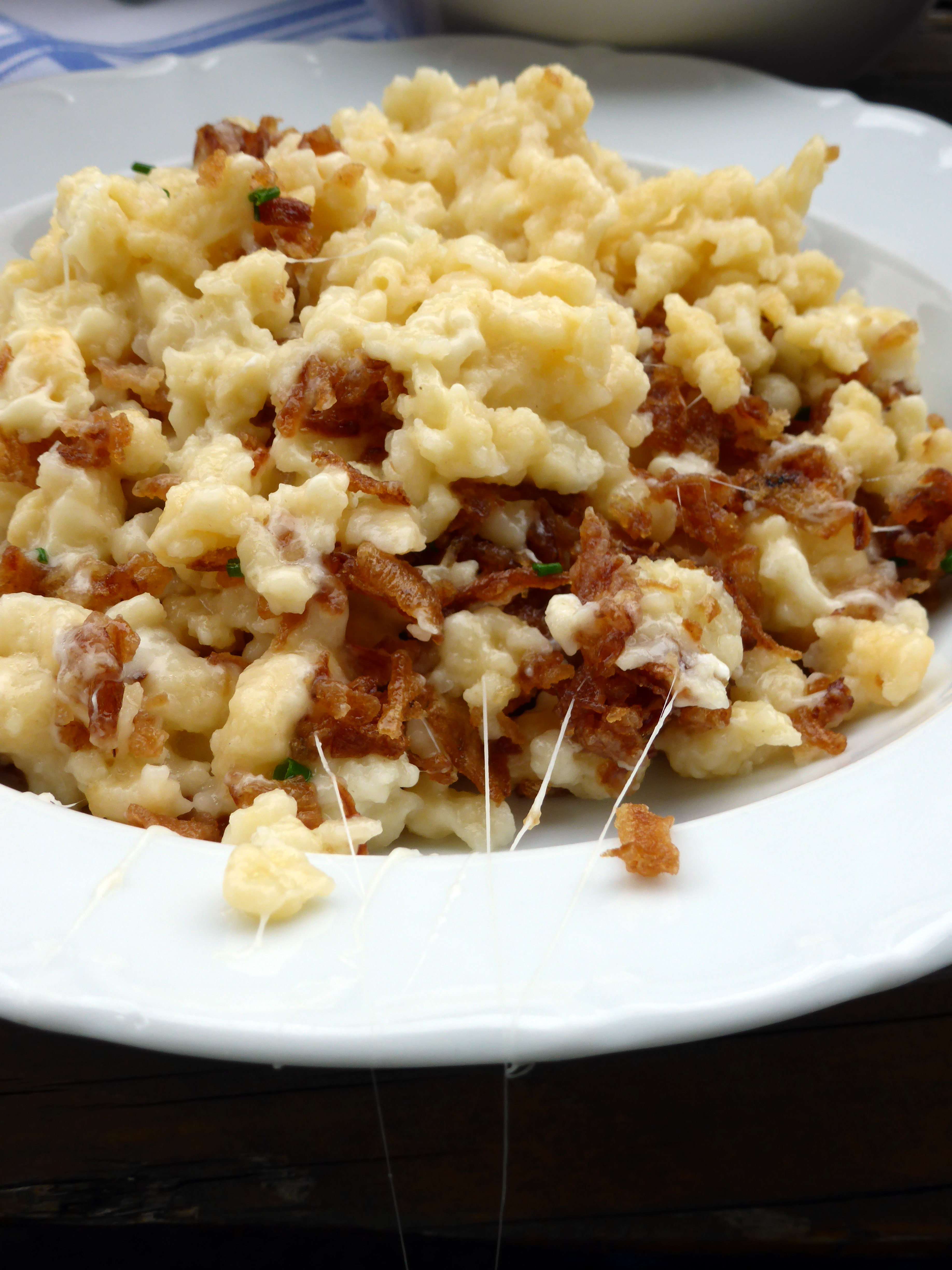 Käsknöpfle im Berggasthof Haldenhof bei Isny-Neutrauchburg.